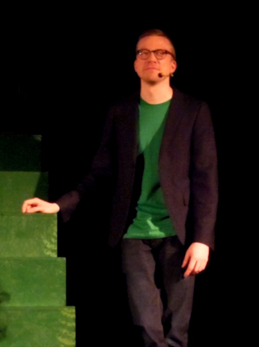 Måns Nilsson under föreställningen "Primater med topplån" på Draken i Göteborg i april 2013.